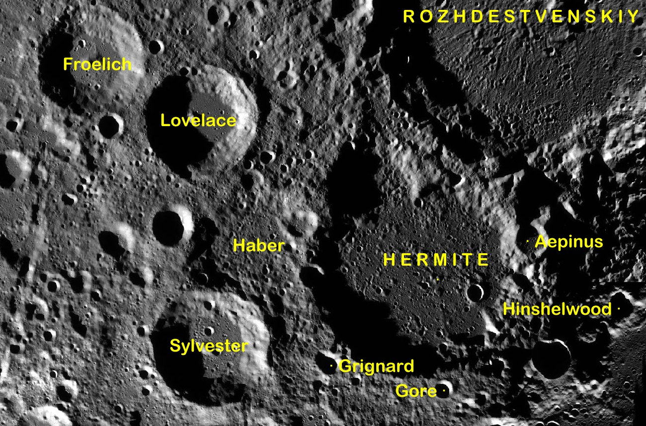 Cráter lunar Gore. Localización. (Imagen LRO)